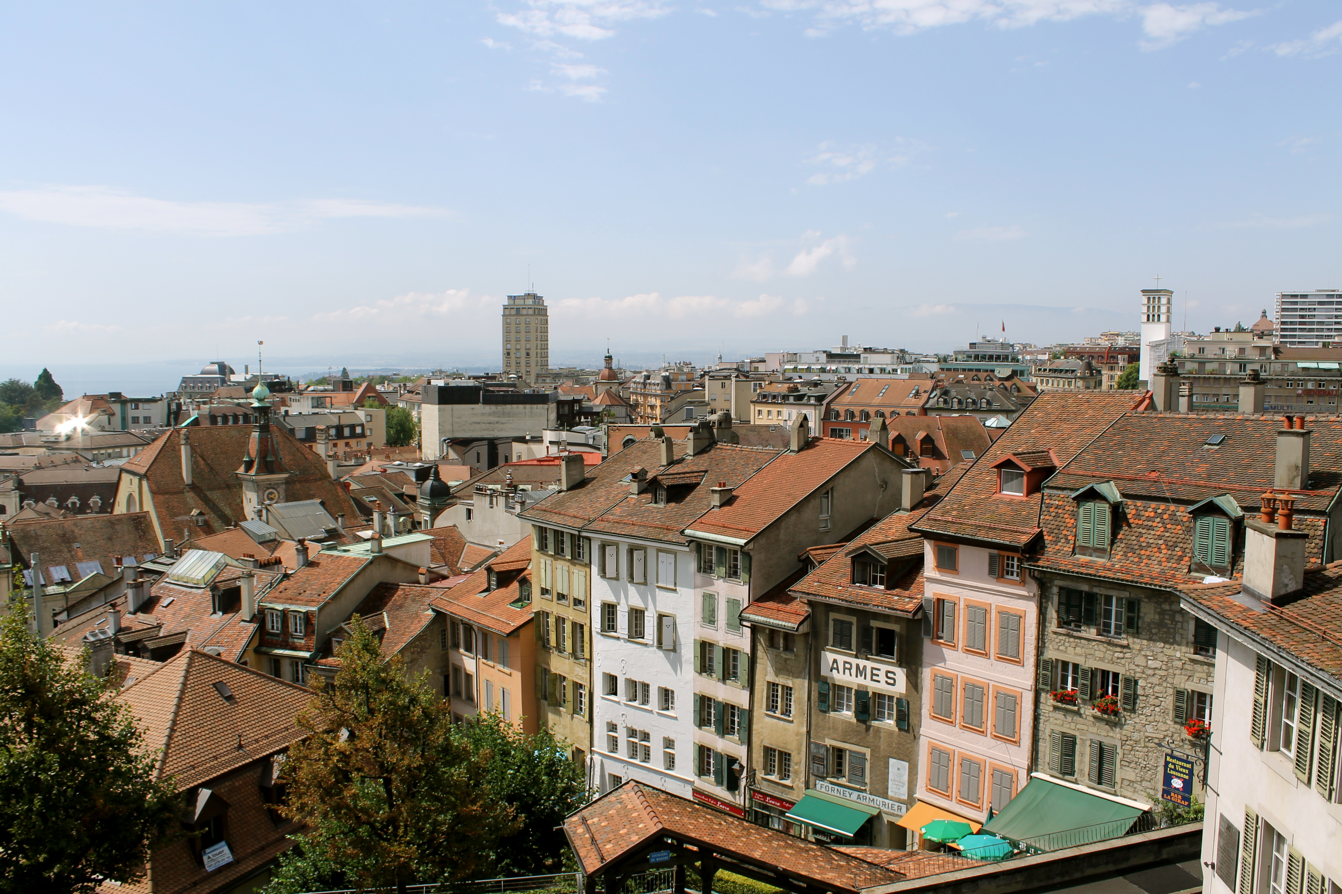 Lausanne